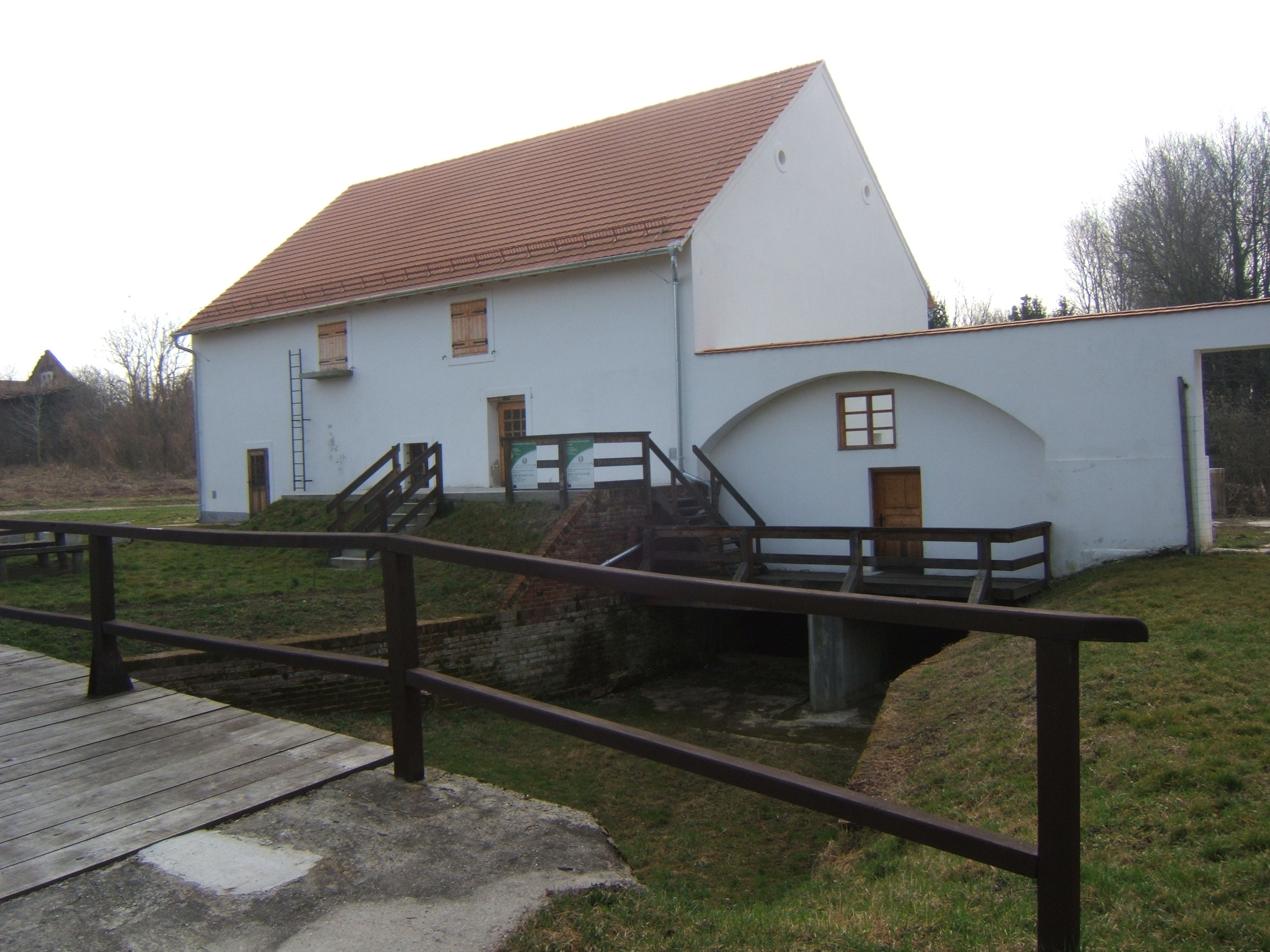 Péterhida, vízimalom